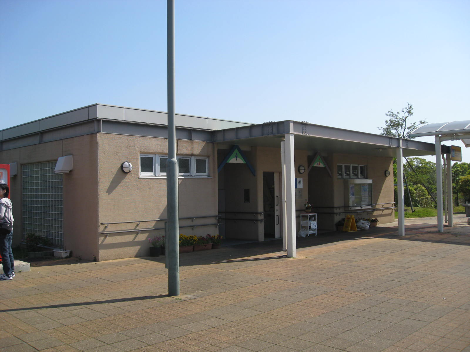 東九州自動車道大分松岡パーキングエリア下りの建物です。